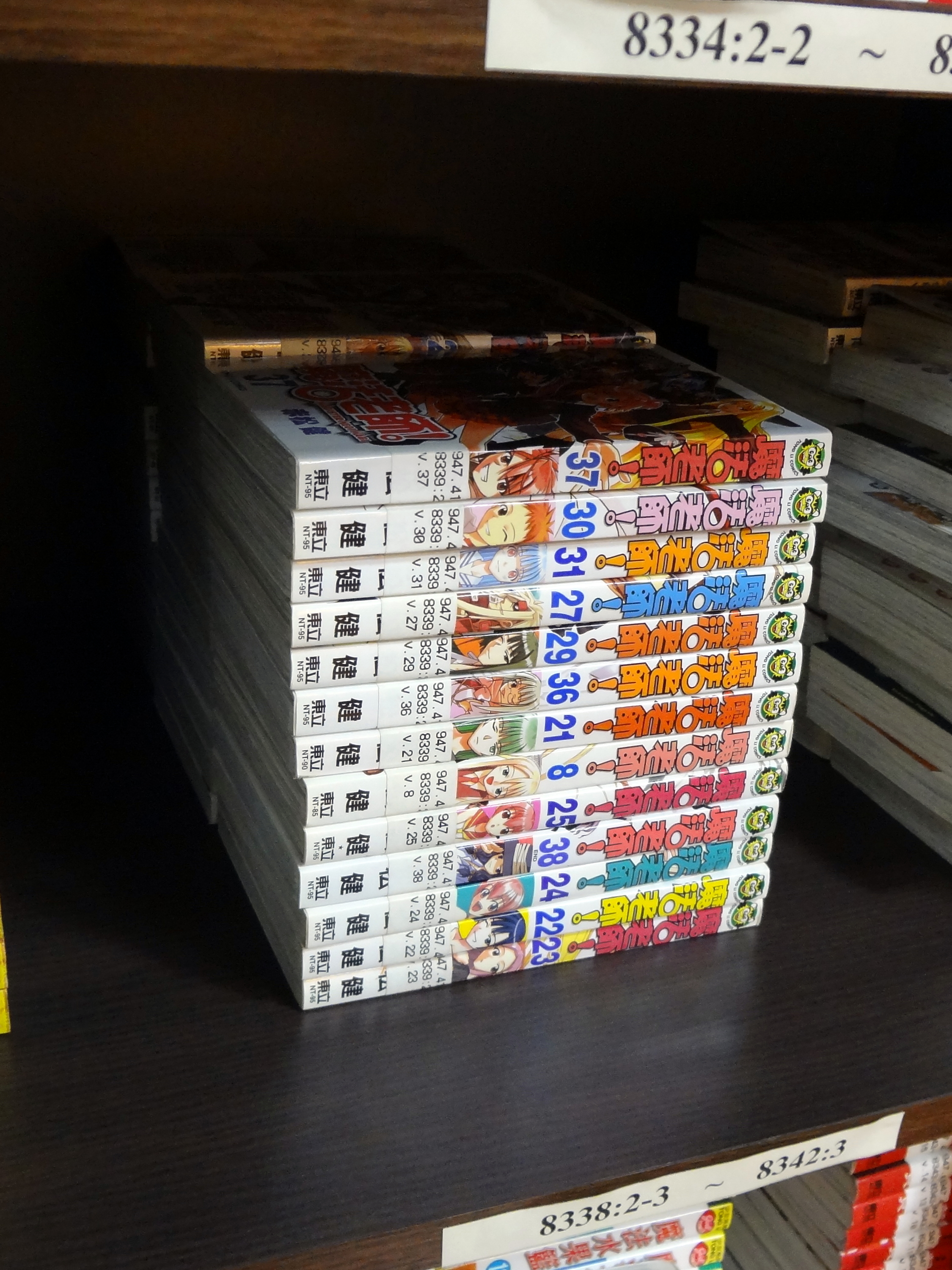 中文（台灣）: 中華民國國家圖書館藝術暨視聽資料中心漫畫屋收藏的東立出版社《魔法老師》臺灣中文版全套單行本。